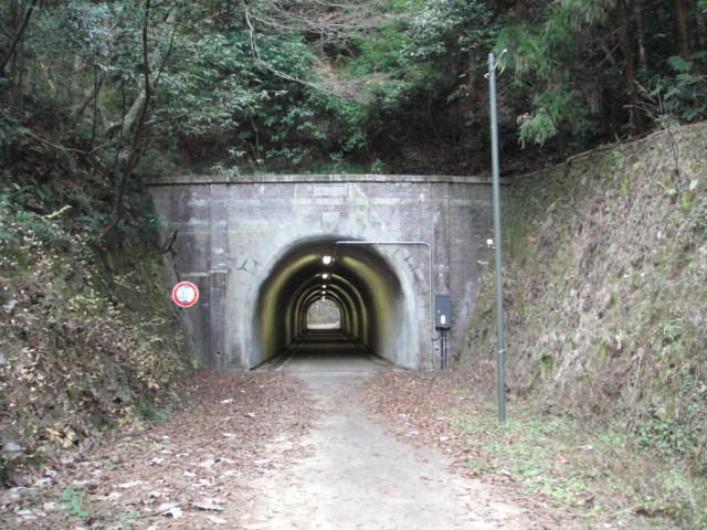 アップロード者によって2009/12/24撮影。